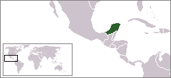 Locatie van de Republiek Yucatán, zelf gemaakt